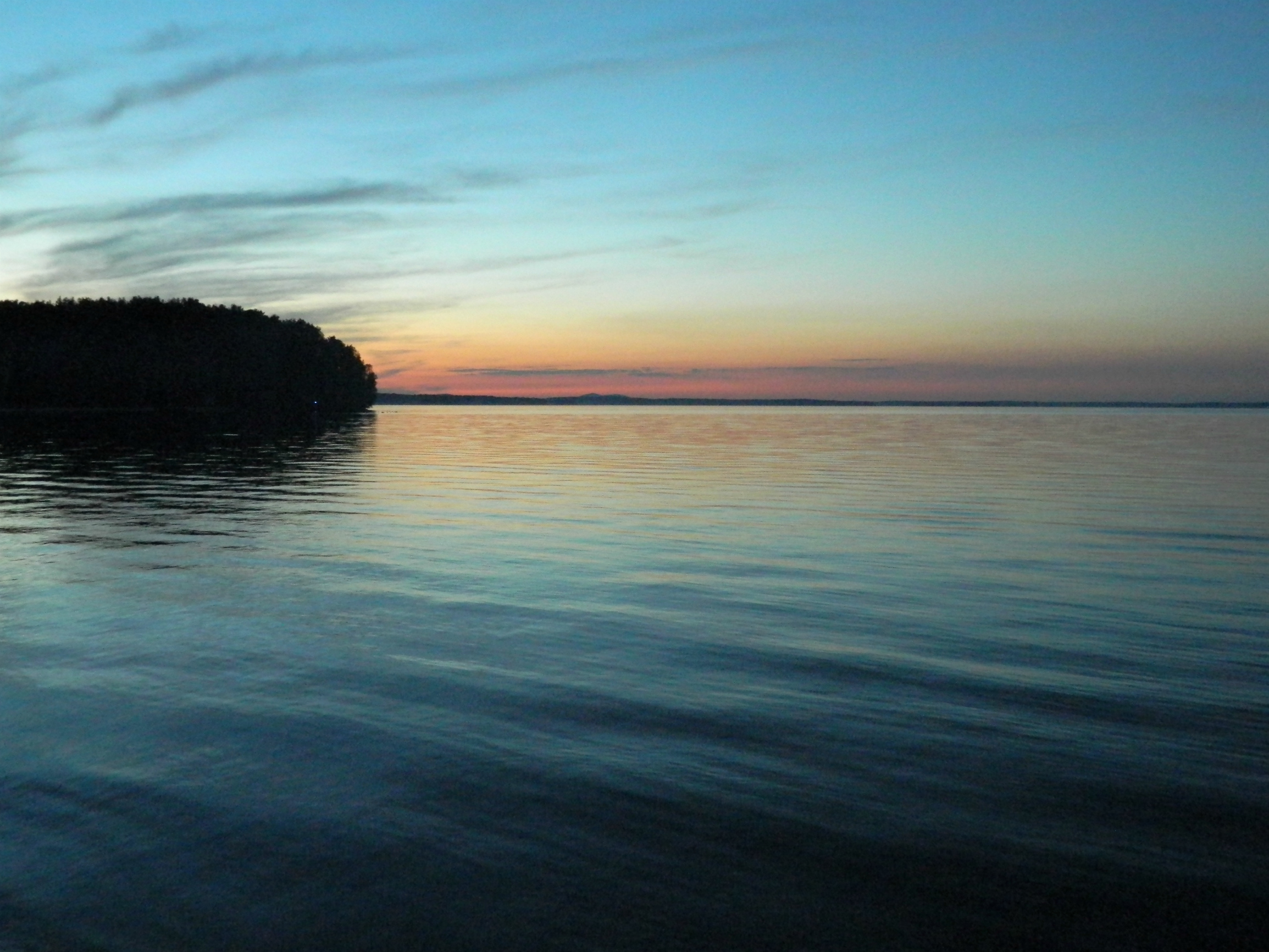 Озеро Увильды: Памятник природы расположен в области предгорий восточного склона Уральских гор в пределах границ Аргаяшского муниципального района, Карабашского и Кыштымского городских округов, Аргаяшский район, Челябинская область This image is related to the protected area of Russia number 7410018